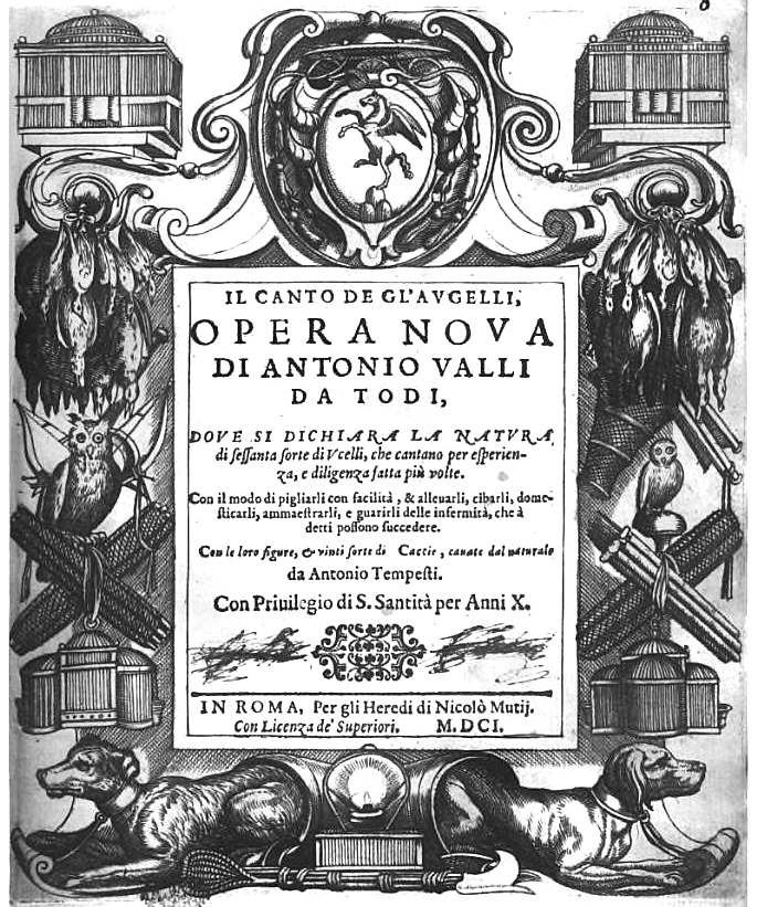 Title page of Il canto de gl'augelli